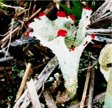 Cladonia pleurota